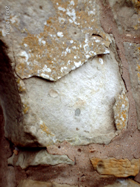 Exfoliering på sten, Kattlunds, Gotland